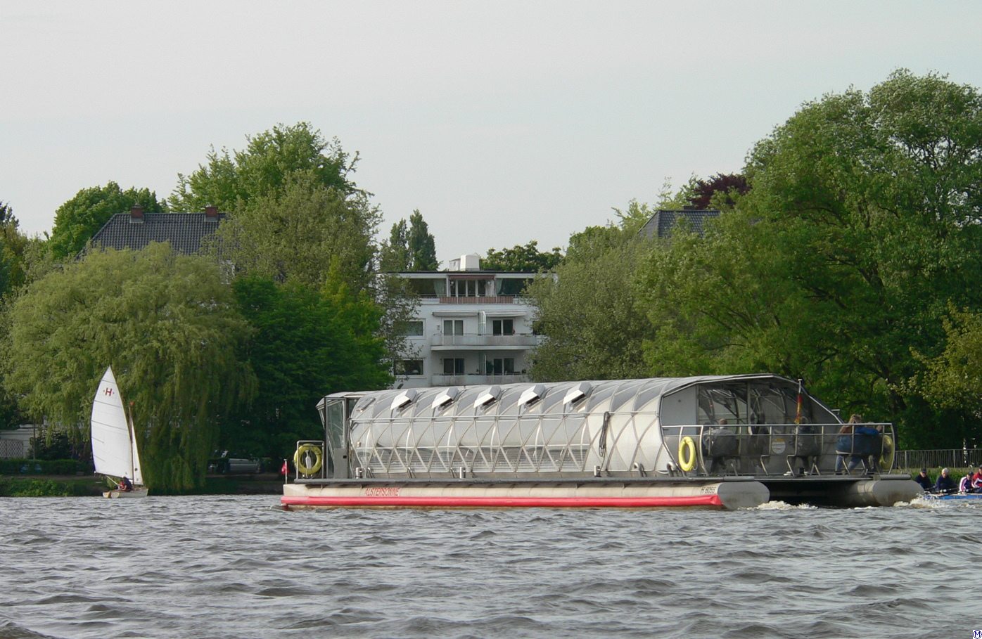 Solarschiff Alstersonne im Katamaranaufbau, Hamburg 19.05.2005.